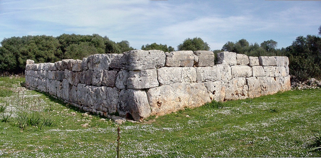 Hospitalet Vell - Punic Wall